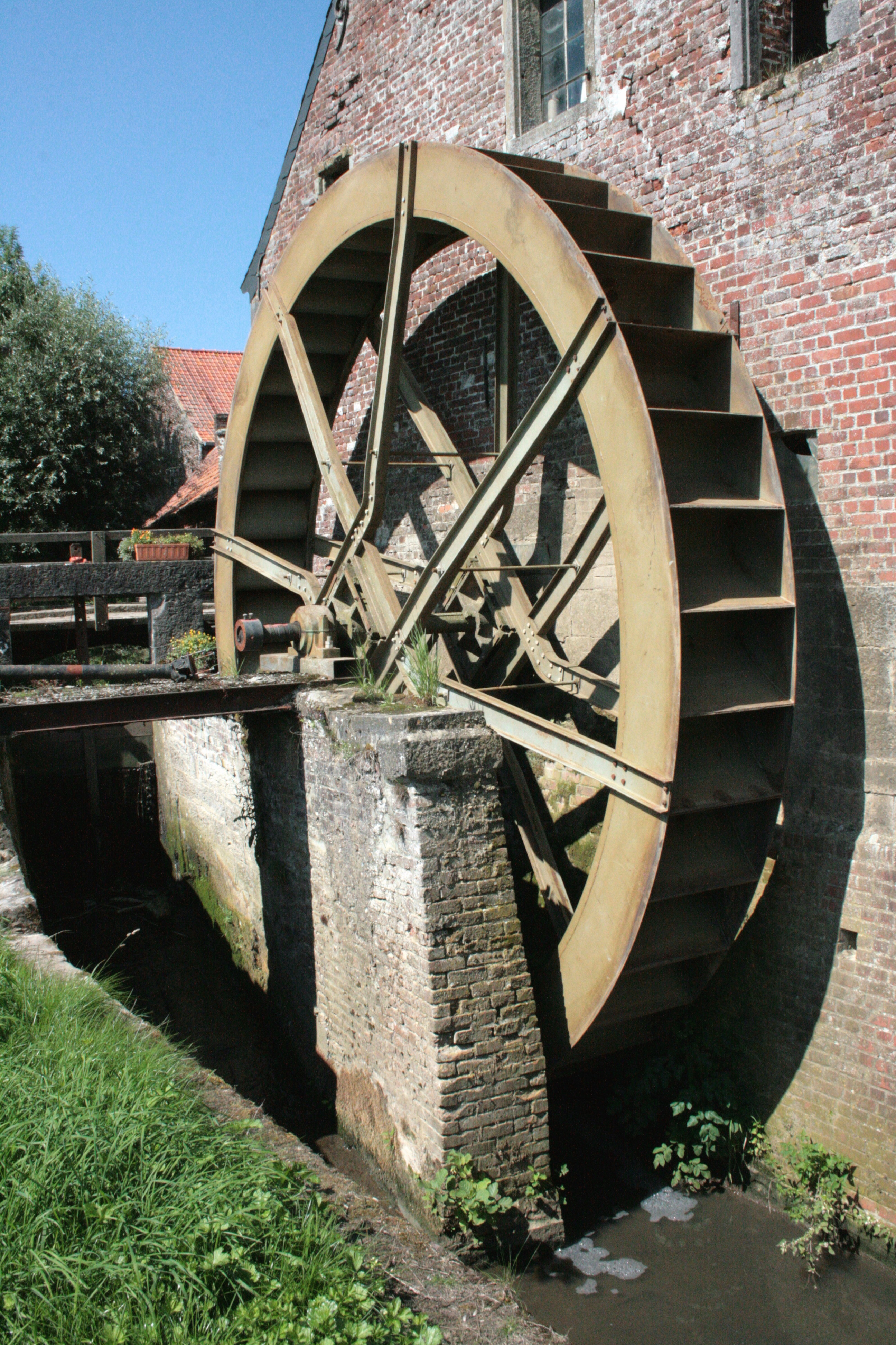 Moulin du Tordoir, Vert Marais, Wodecq (Ellezelles), Belgique